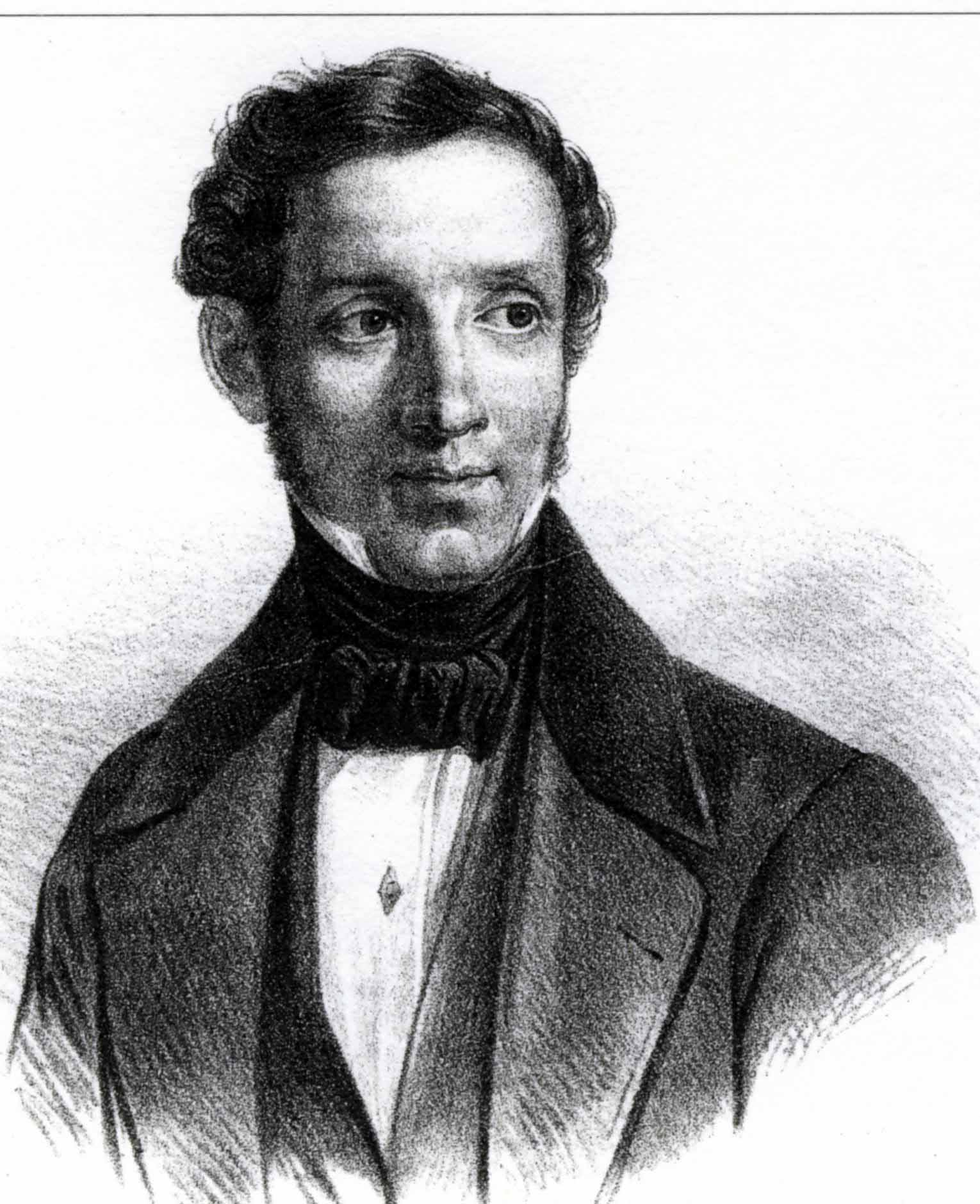 Ritratto di Giuseppe Bonolis